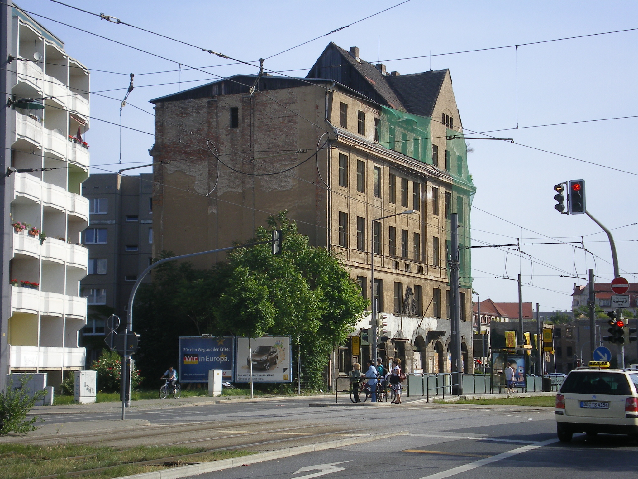 Dresden, Friedrichstadthaus Löbtauer Strasse 2, Architekt Prof. Hans Erlwein